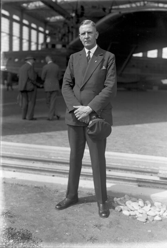 Das grösste Flugboot der Welt "Do X" ein Wunderwerk deutscher Technik! Das grösste 12 Motoren-Flugboot der Welt "Do X" wurde in den Dornier-Werken in Altenrhein/Schweiz nach anderthalbjähriger Arbeit fertiggestellt. "Do X", genannt das fliegende Hotelschiff, kann hundert Passagiere aufnehmen und 12 Motoren von insgesamt 6000 P.S. treiben das fliegende Hotel zu einer Höchstgeschwindigkeit von ca. 250 km. in der Stunde an. Höchster Komfort, wie Passagier-Deck, Tanzsaal, Salon, sind in dem Riesen-Flugboot vorhanden. Die Tragflächen des Flugbootes haben eines Länge von insgeamt 42 m. Eigens durch die Maschinen-zentrale werden unter dem Kommando eines Ingenieurs die 12 Mototren bedient. Der Führer des Riesenflugbootes "Do X" Chefpilot Wagner der Dornierwerke, welcher auch die ersten Probeflüge machen wird.